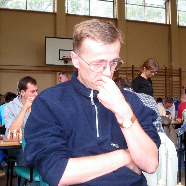 Bogusław Sygulski, Lublin 2006